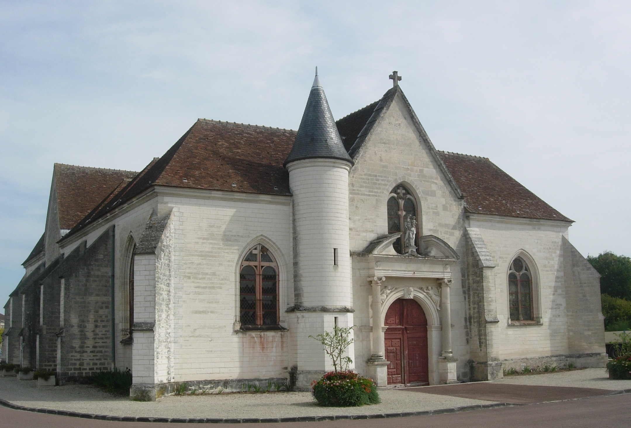 Eglise des Noés-près-Troyes .